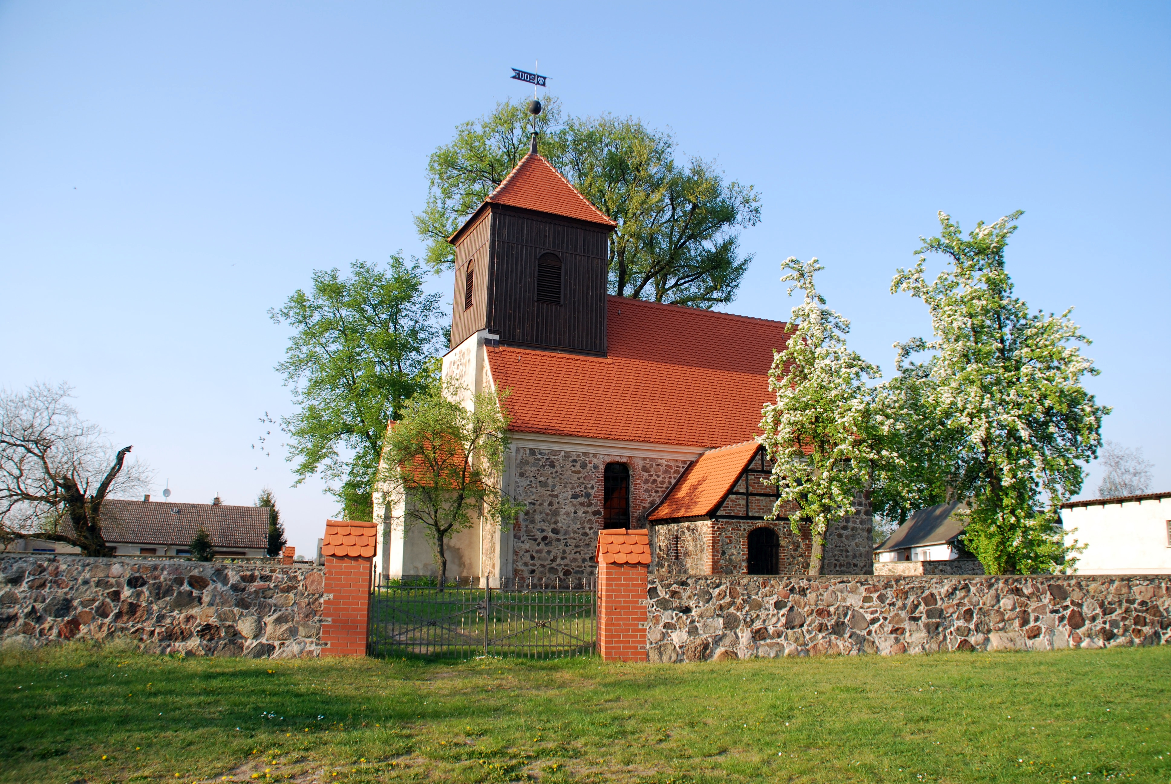 Dorfkirche mit Kirchhofseinfriedung Lichtenow